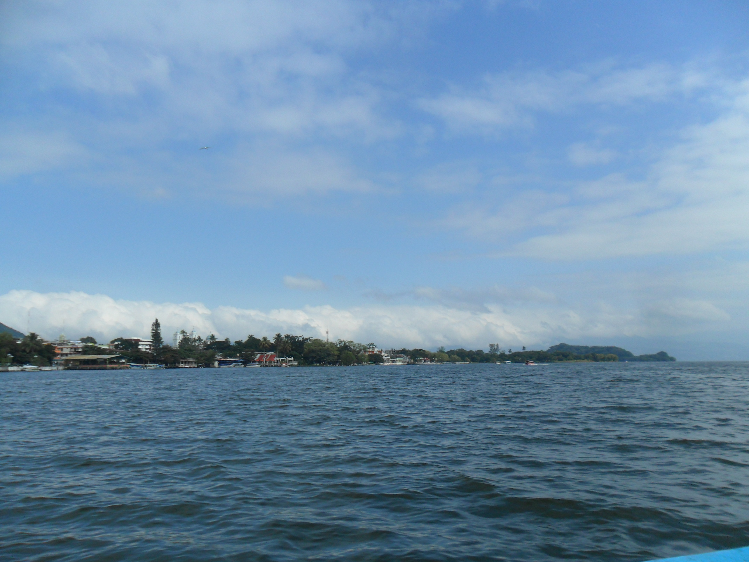 Catemaco, Ver